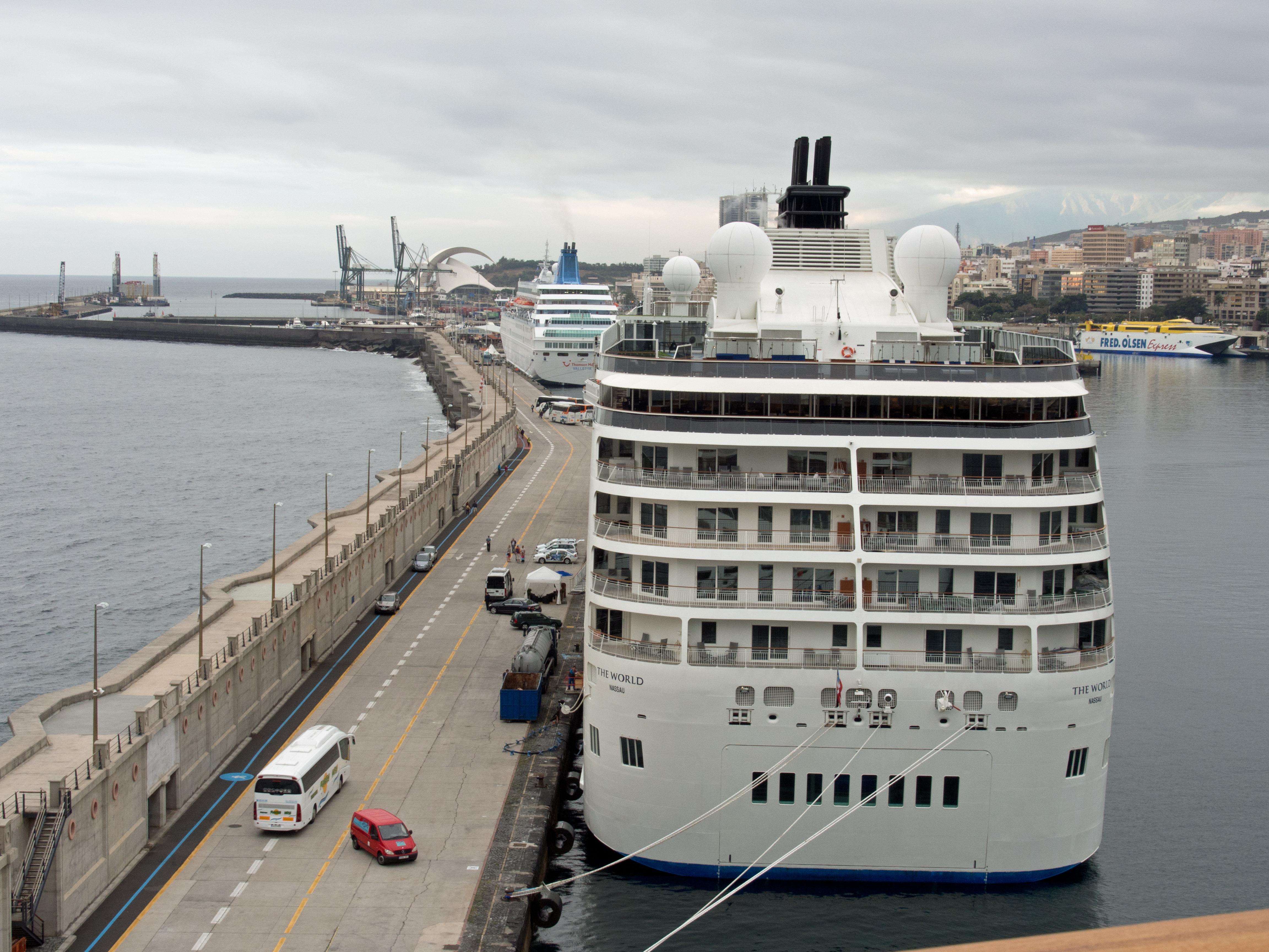 Im Hafen von Santa Cruz de Tenerife